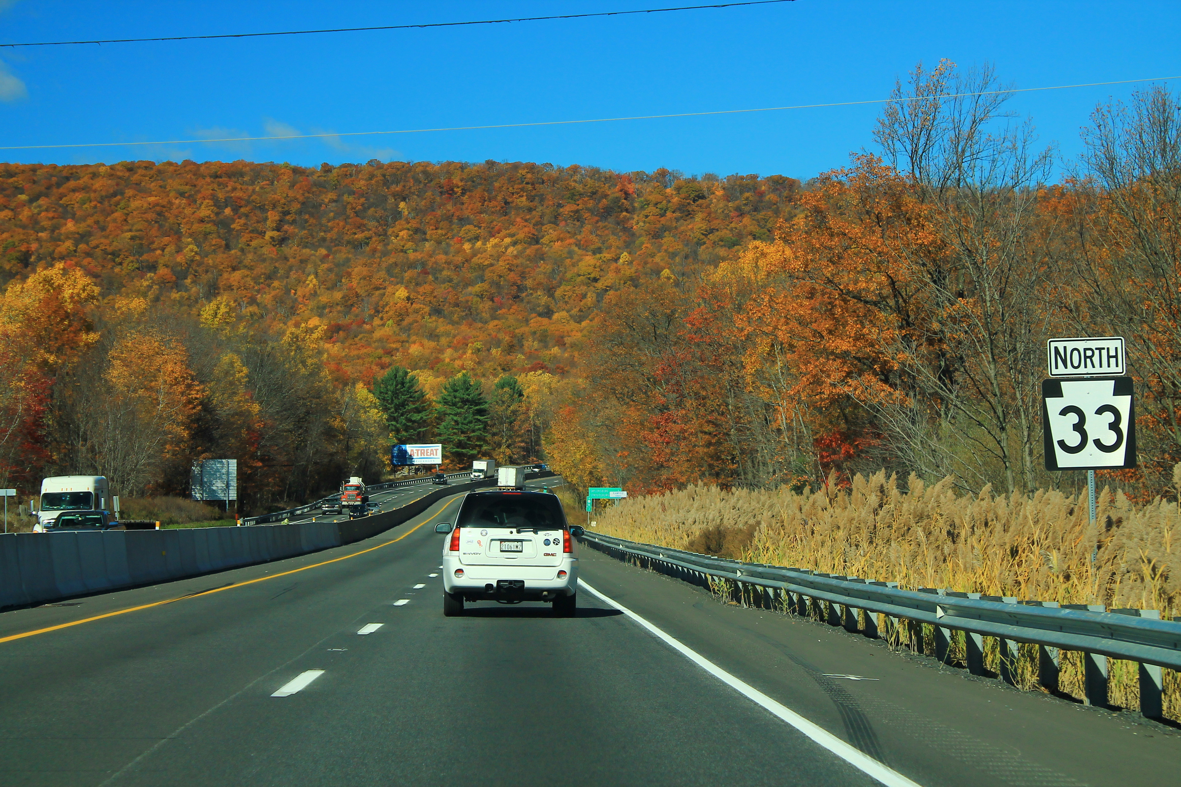 PA33nRoadSign-Autumn